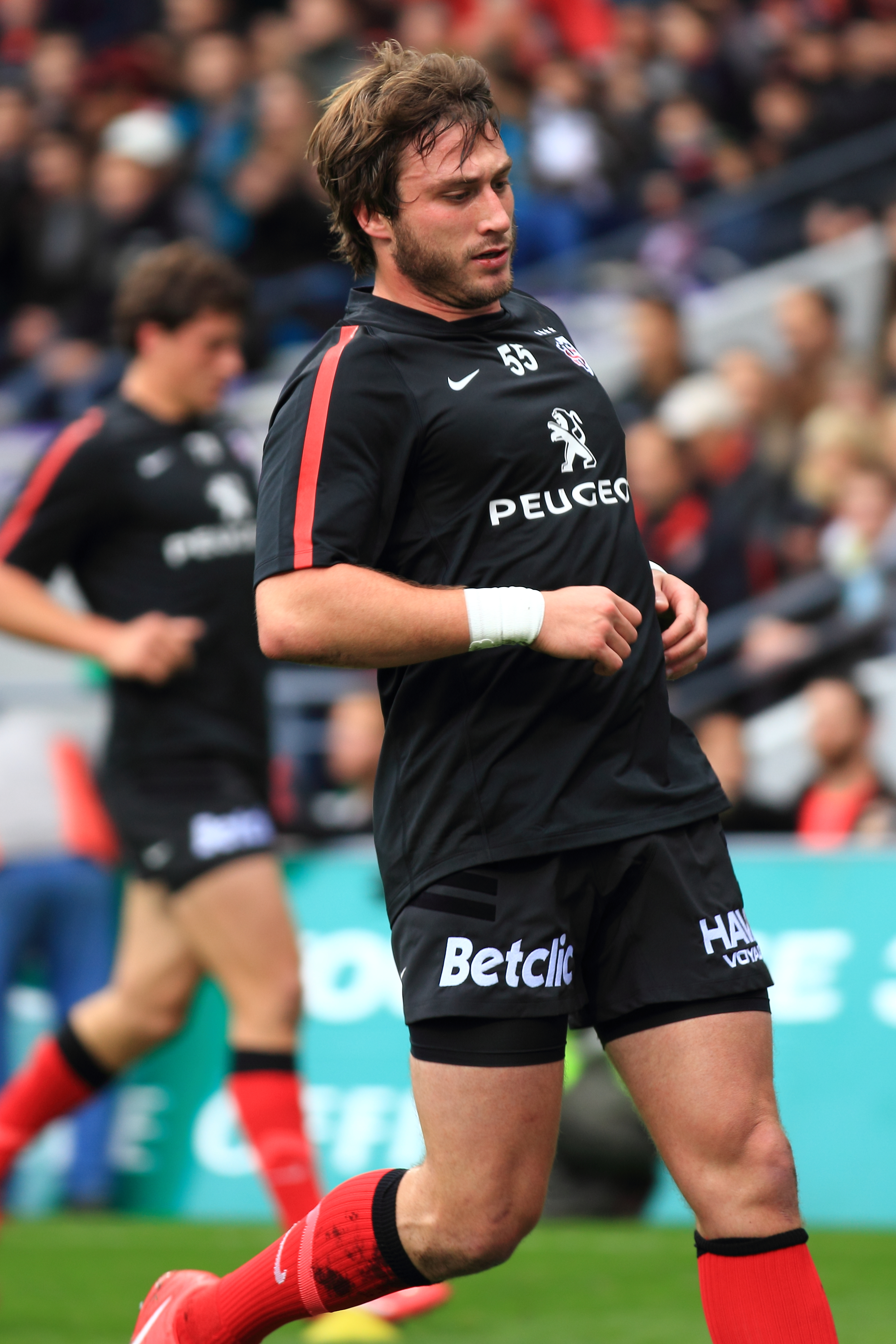 Stade toulousain contre l'USAP - Echauffement